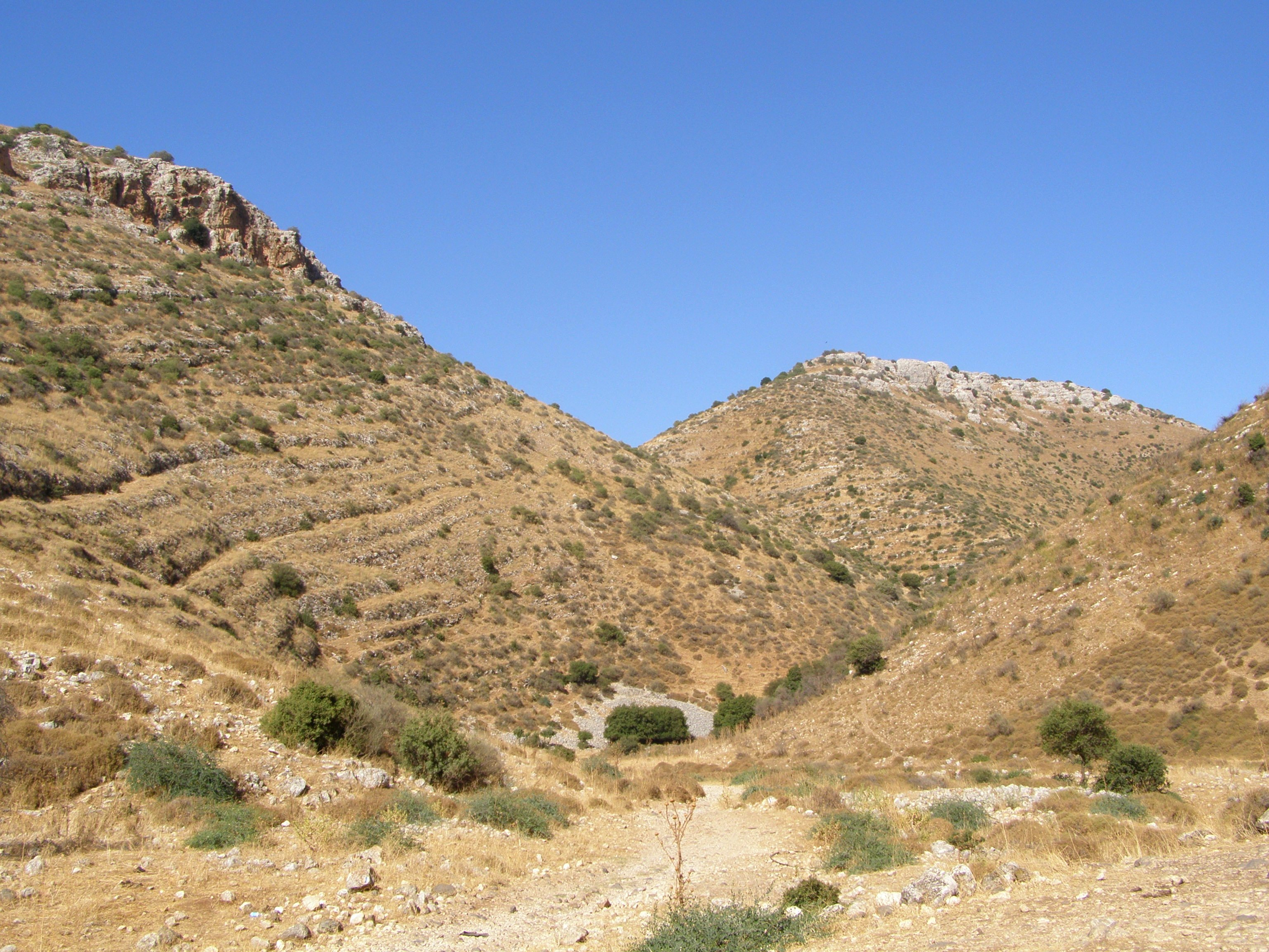 Izrael, Horní Galilea, Nachal Dišon